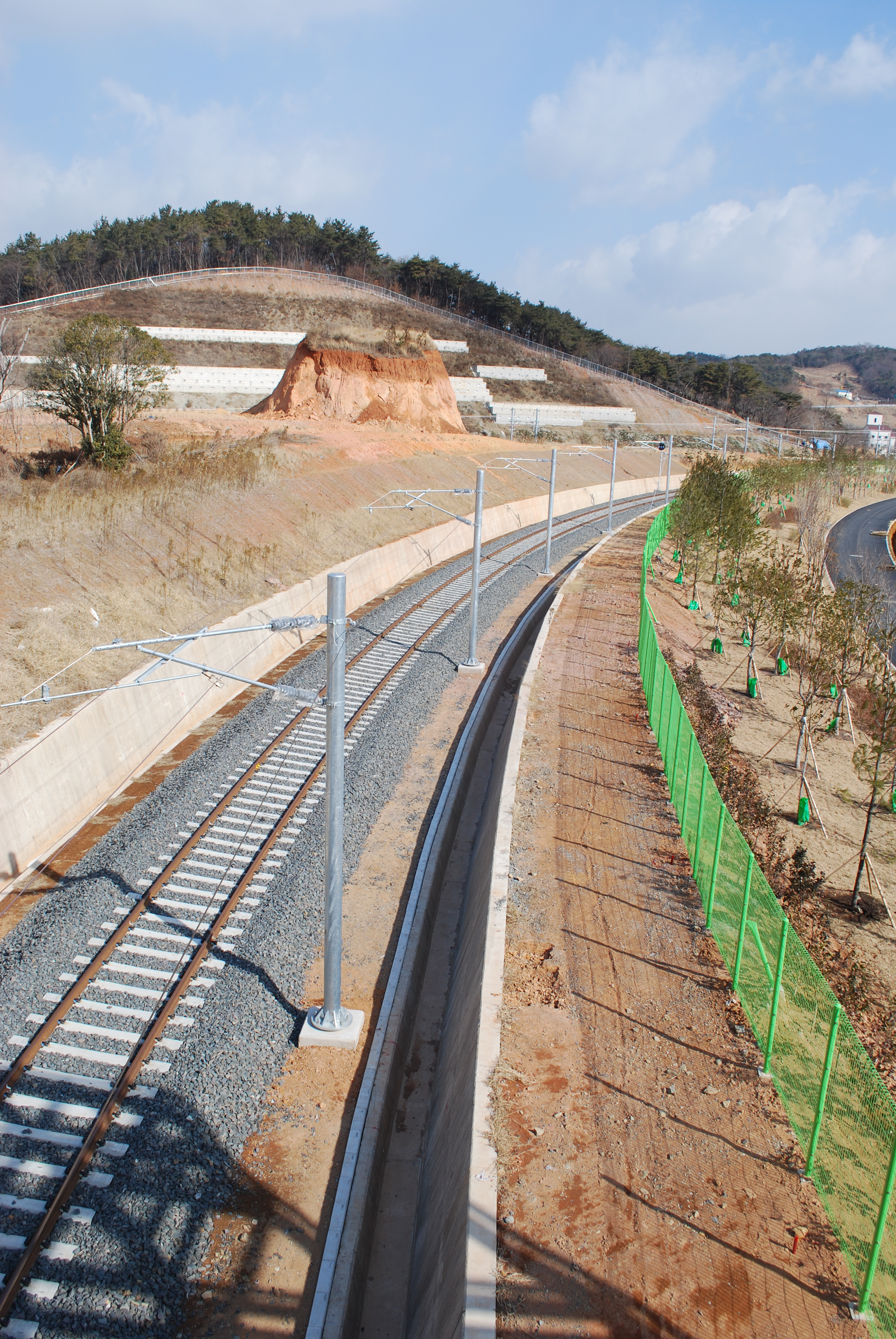 전경삼각선을 철교에서 찍은 모습